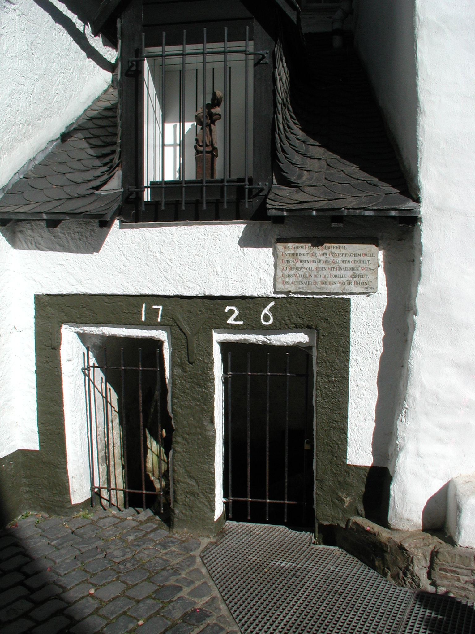 Blankenheim - Ahr